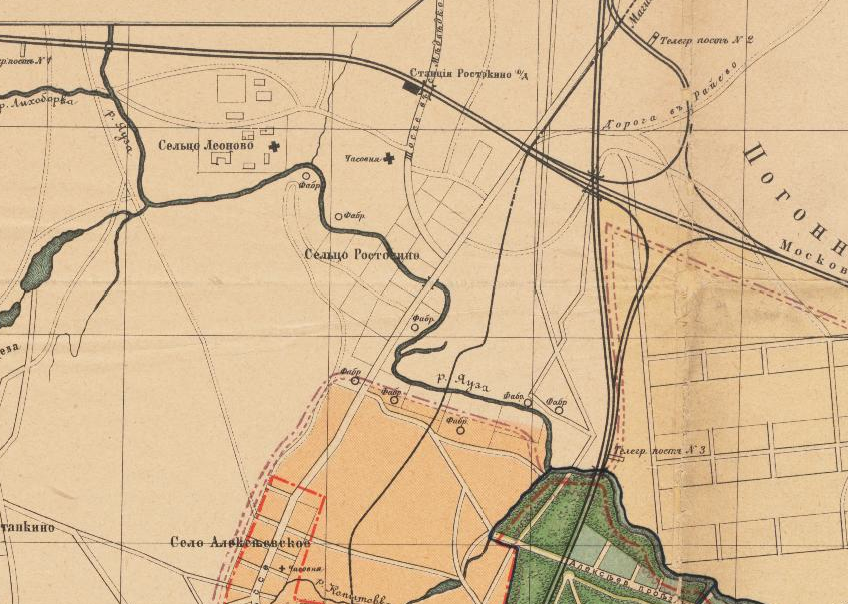 Село на карте 1915 года (фрагмент).